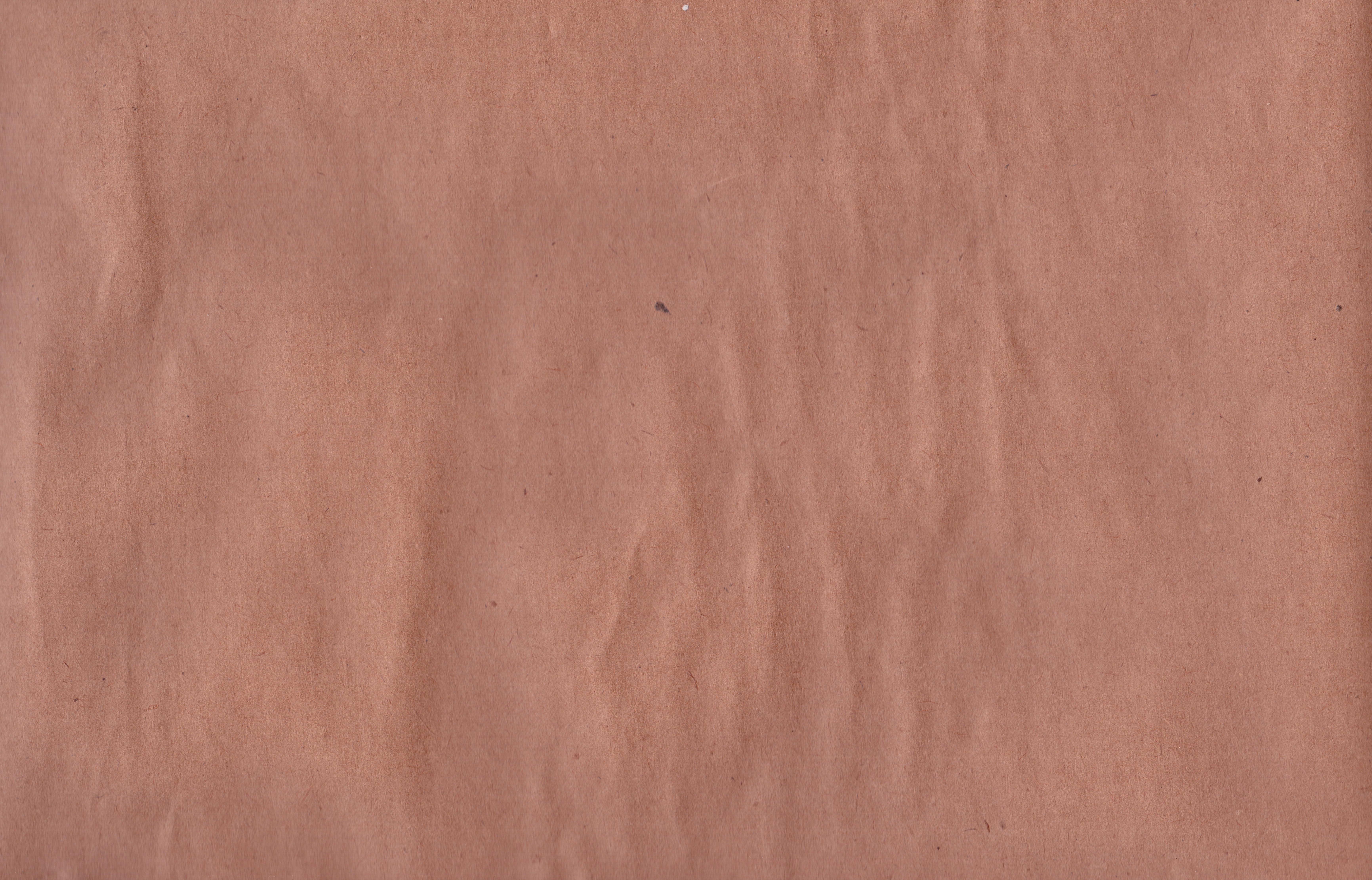 Текстура старой бумаги. Автор — участник Iroi su